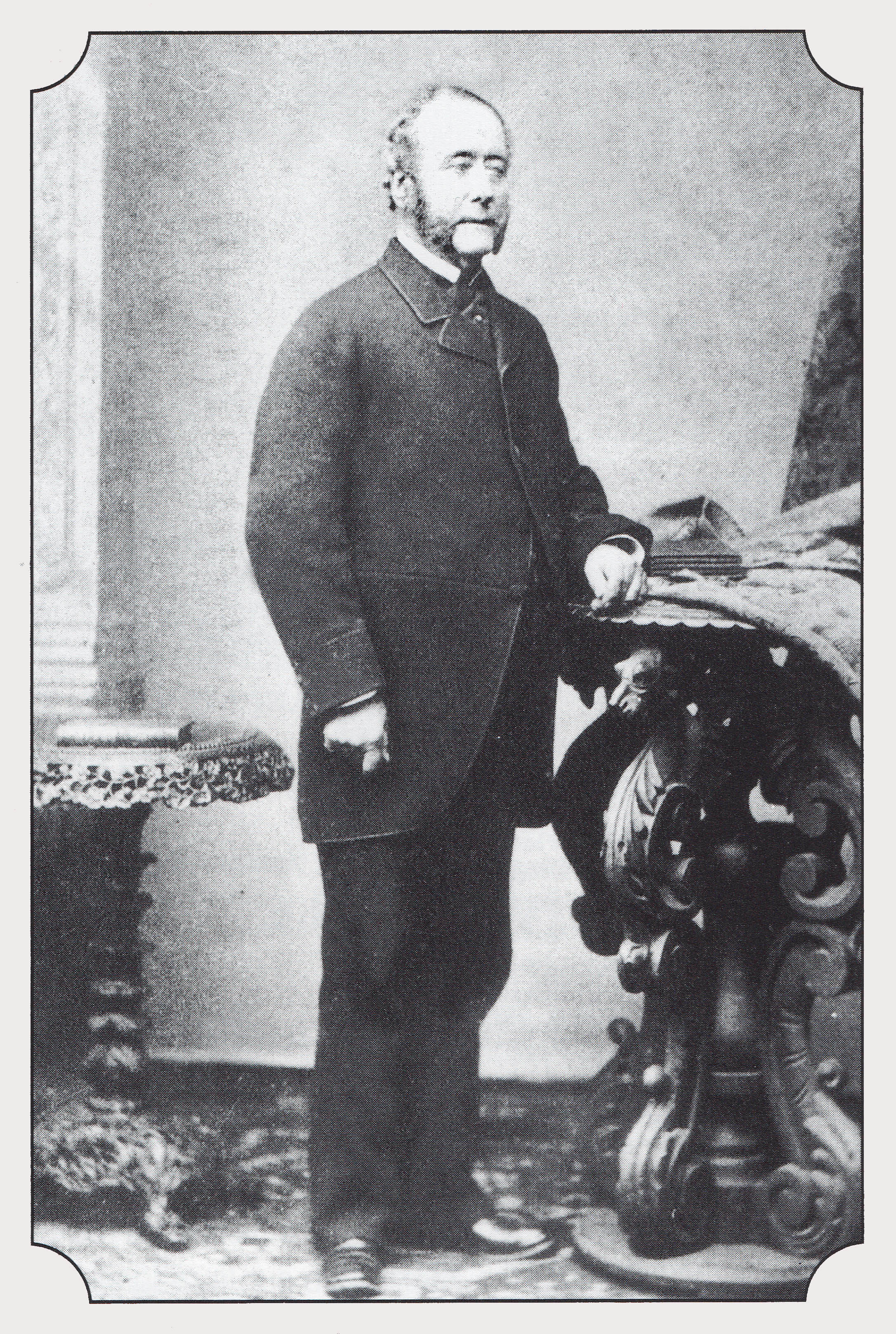 Le Docteur Alexander Taylor